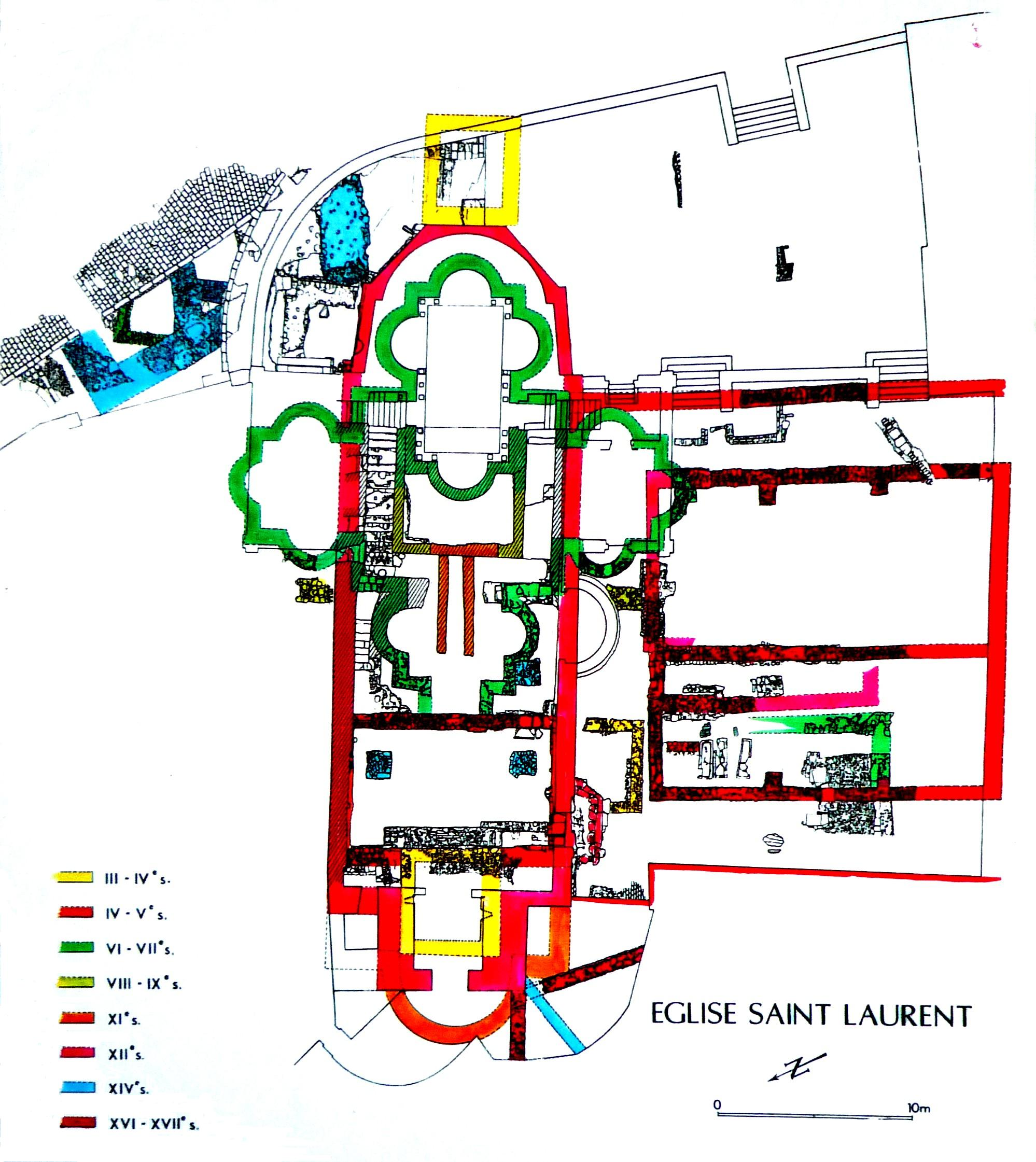 Schéma du site de l'église Saint-Laurent, devenu Musée archéologique de Grenoble en 1986.